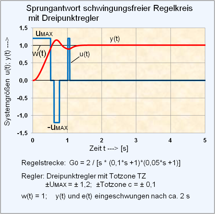 Schwingungsfreier Regelkreis 3. Ordnung mit Dreipunkt-Regler